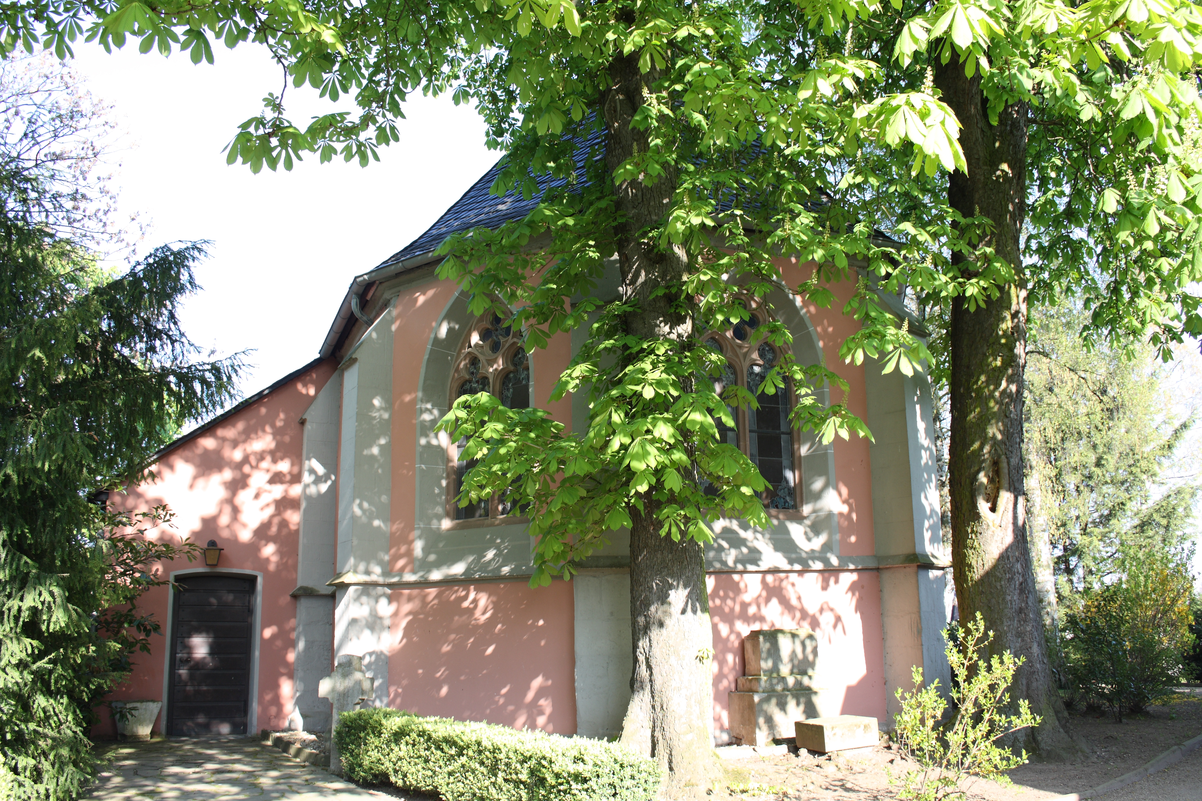 alte Kirche St. Johann Baptist in Niederberg